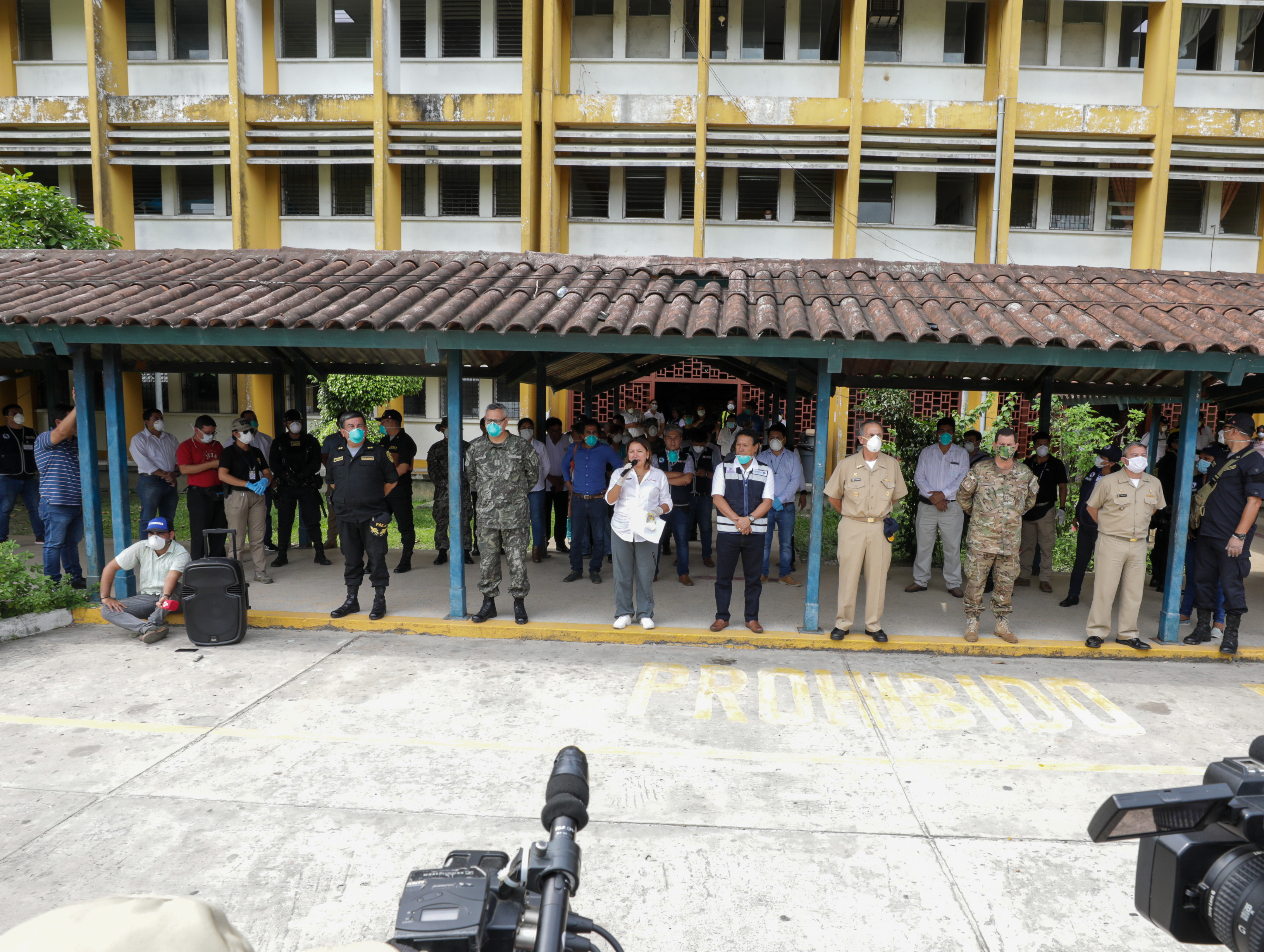 Ministra de la Producción, Rocío Barrios, llegó a la ciudad de Iquitos a fin de coordinar con las autoridades regionales y del sector salud, acciones de prevención y contención del coronavirus en la región Loreto.